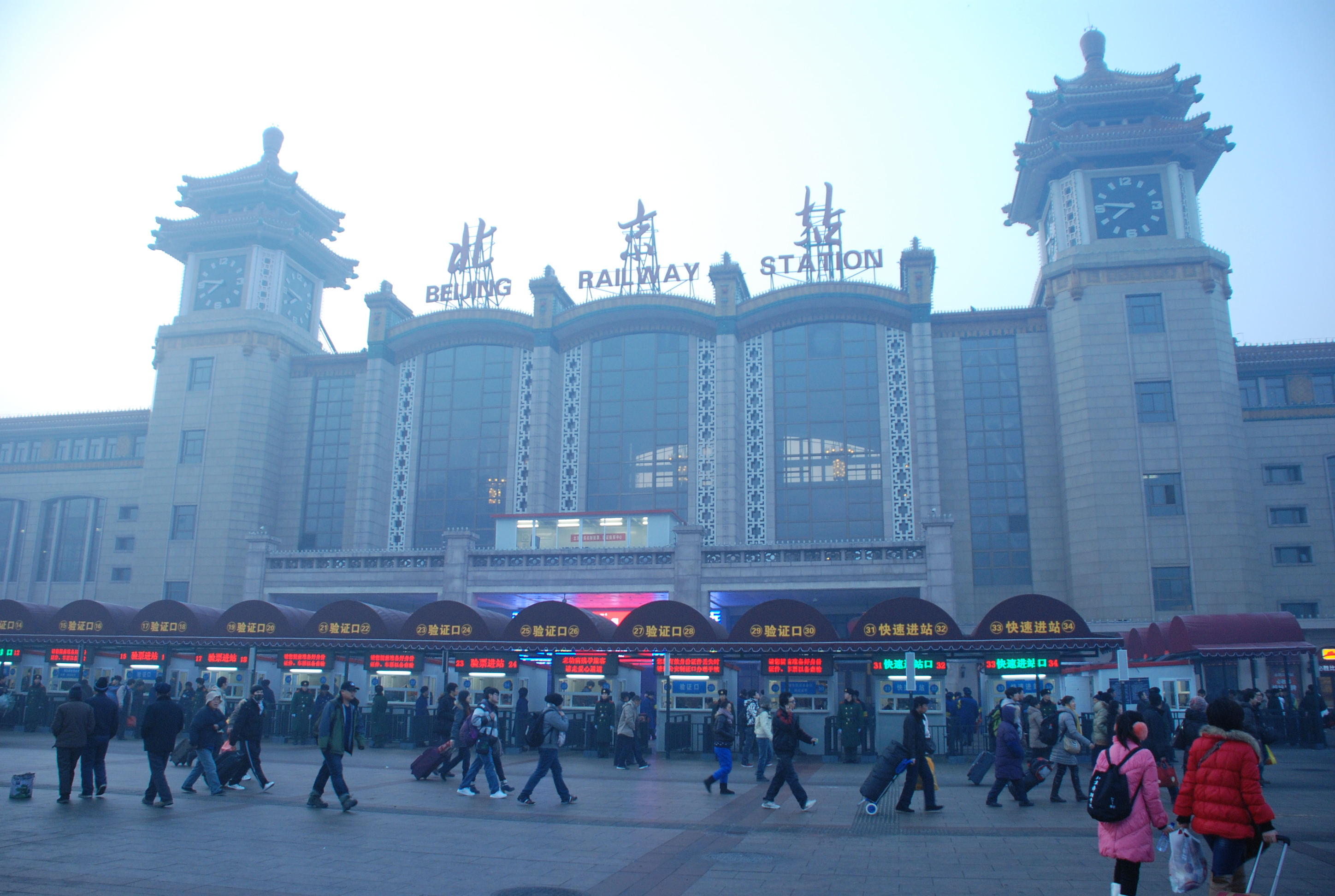 中文（中国大陆）: 2012年春运中的北京站。